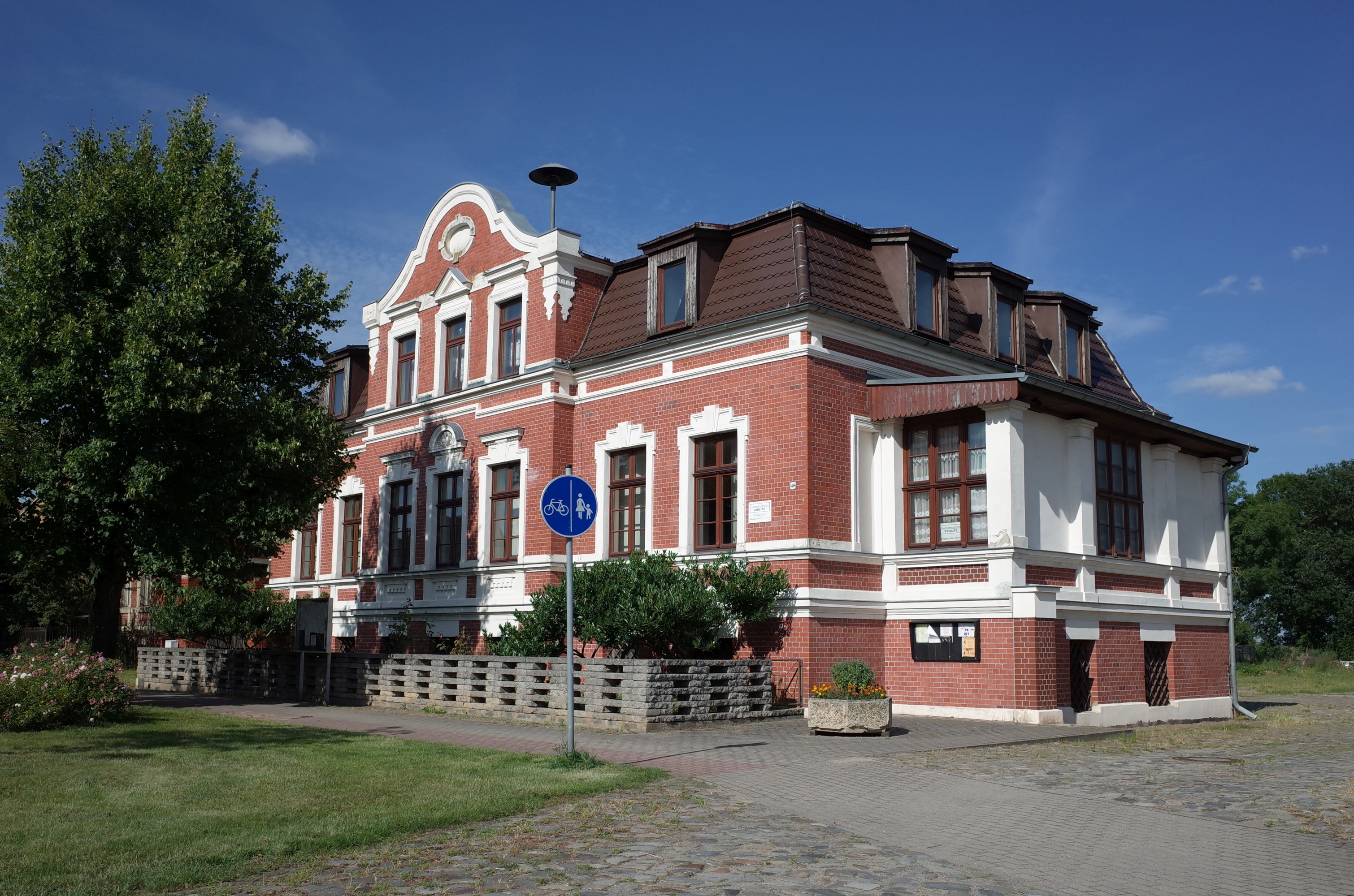 Gommern, Ortsteil Vehlitz, Gemeindebüro Vehlitz, Ernst-Thälmann-Straße 49.